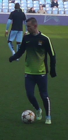 Bersant Celina avec Manchester City le 24 février 2015